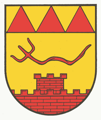 Wappen von Oberweiler im Tal